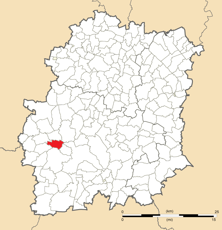 Carte de position de Boutervilliers en Essonne (91)